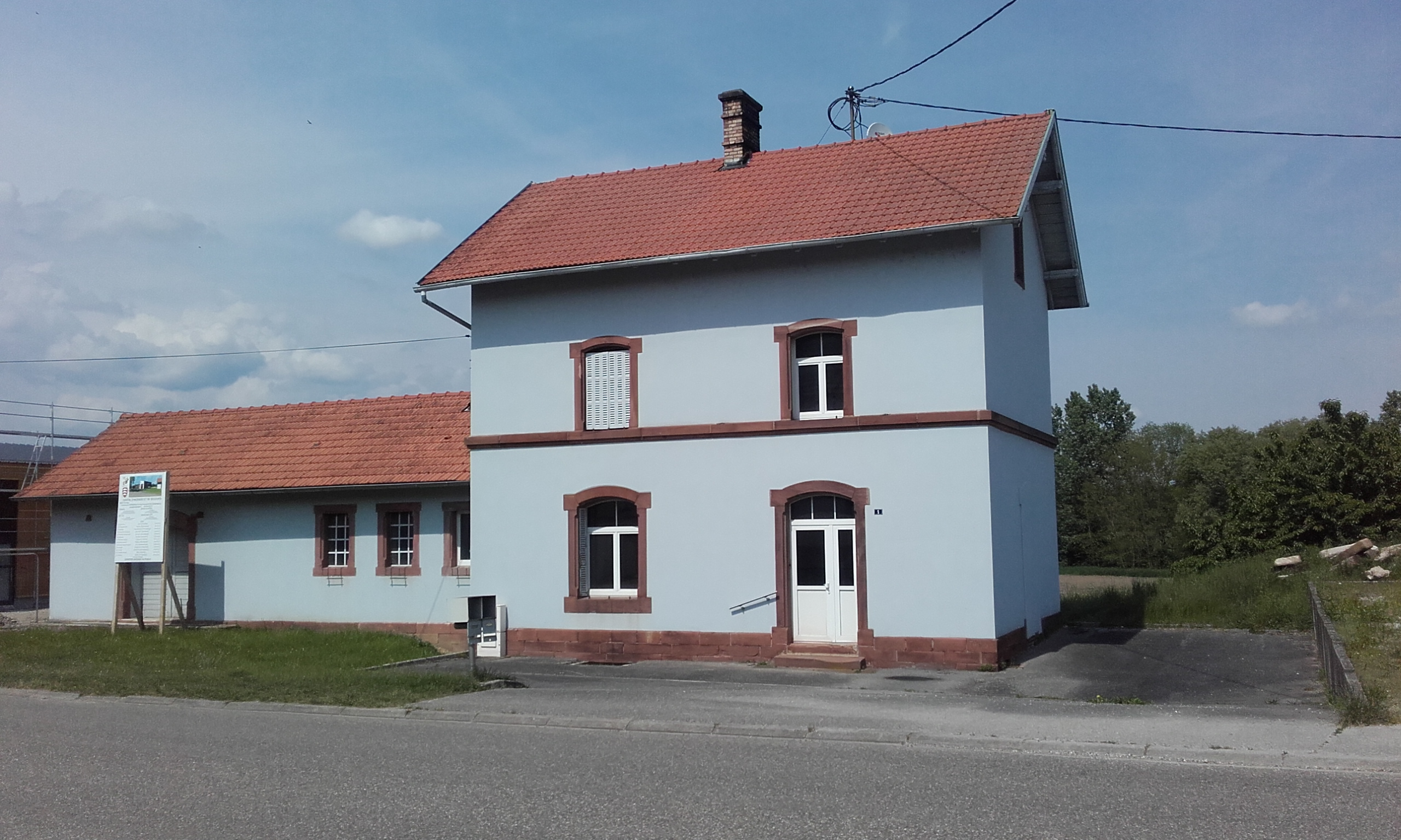 Bas-Rhin, Durrenbach, ancien gare